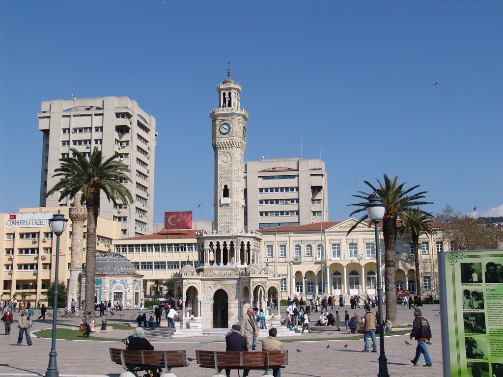 İzmir clock tower located at Konak Square, İzmir, Turkeyİzmir'e yaz geldi :)